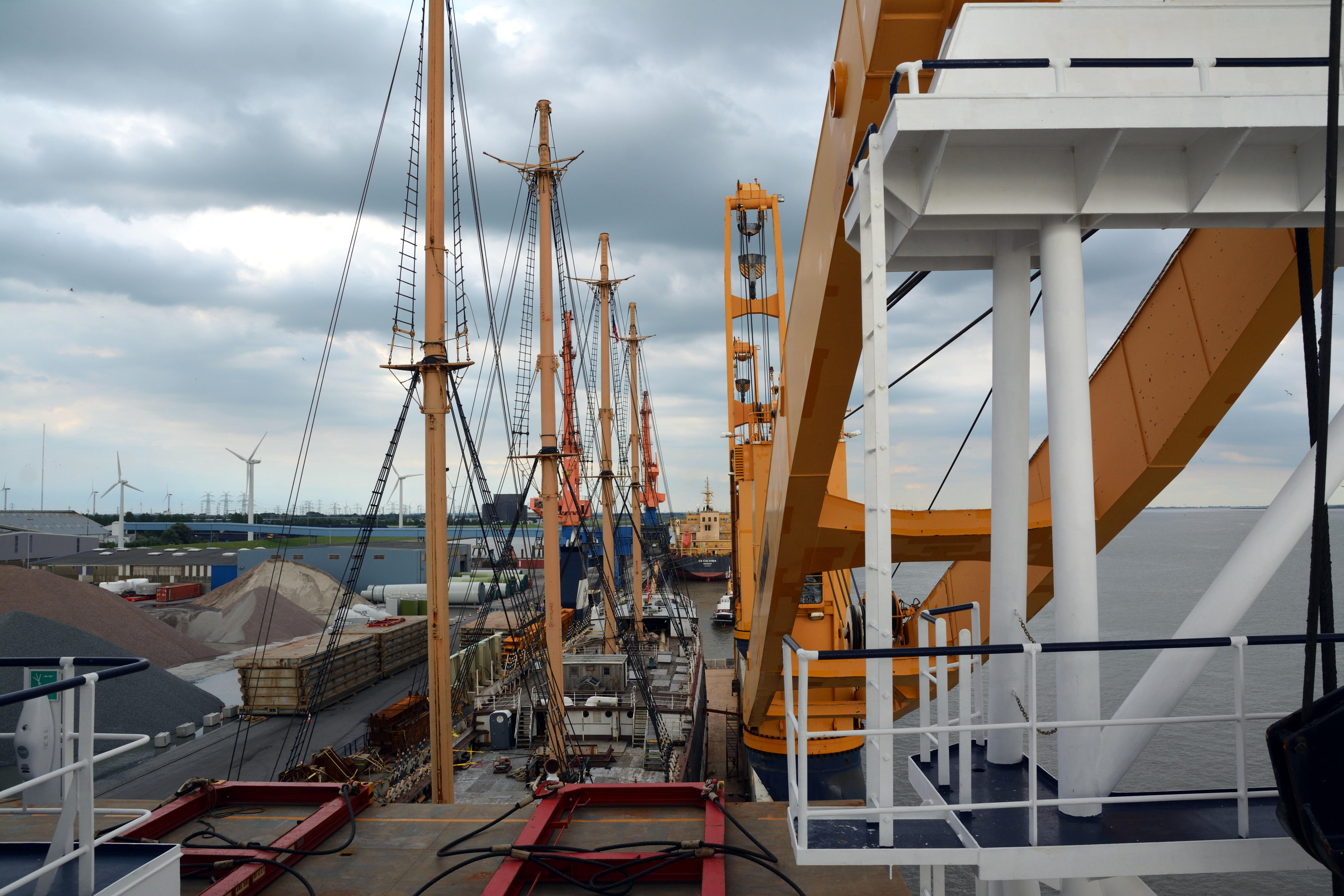 Die Peking wurde im Juli 2017 vom Museumshafen im South Street Seaport nach Deutschland mit dem Dockschiff Combi Dock III nach Brunsbüttel überführt. Dieses Foto entstand im Elbehafen Brunsbüttel. Eine Besichtigung im Dock war aus Sicherheitsgründen nicht möglich, nur Blicke von der Brücke. Auch wenn das Wetter alles andere als fotofreundlich war: Enjoy!